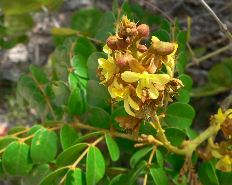 Caesalpinia bonduc, racème, Guadeloupe